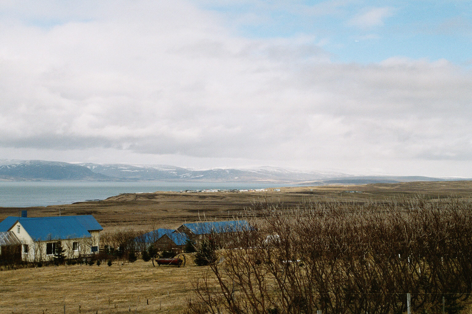 Der Ort Búðardalur im Osten von Hvammsfjörður auf Island.